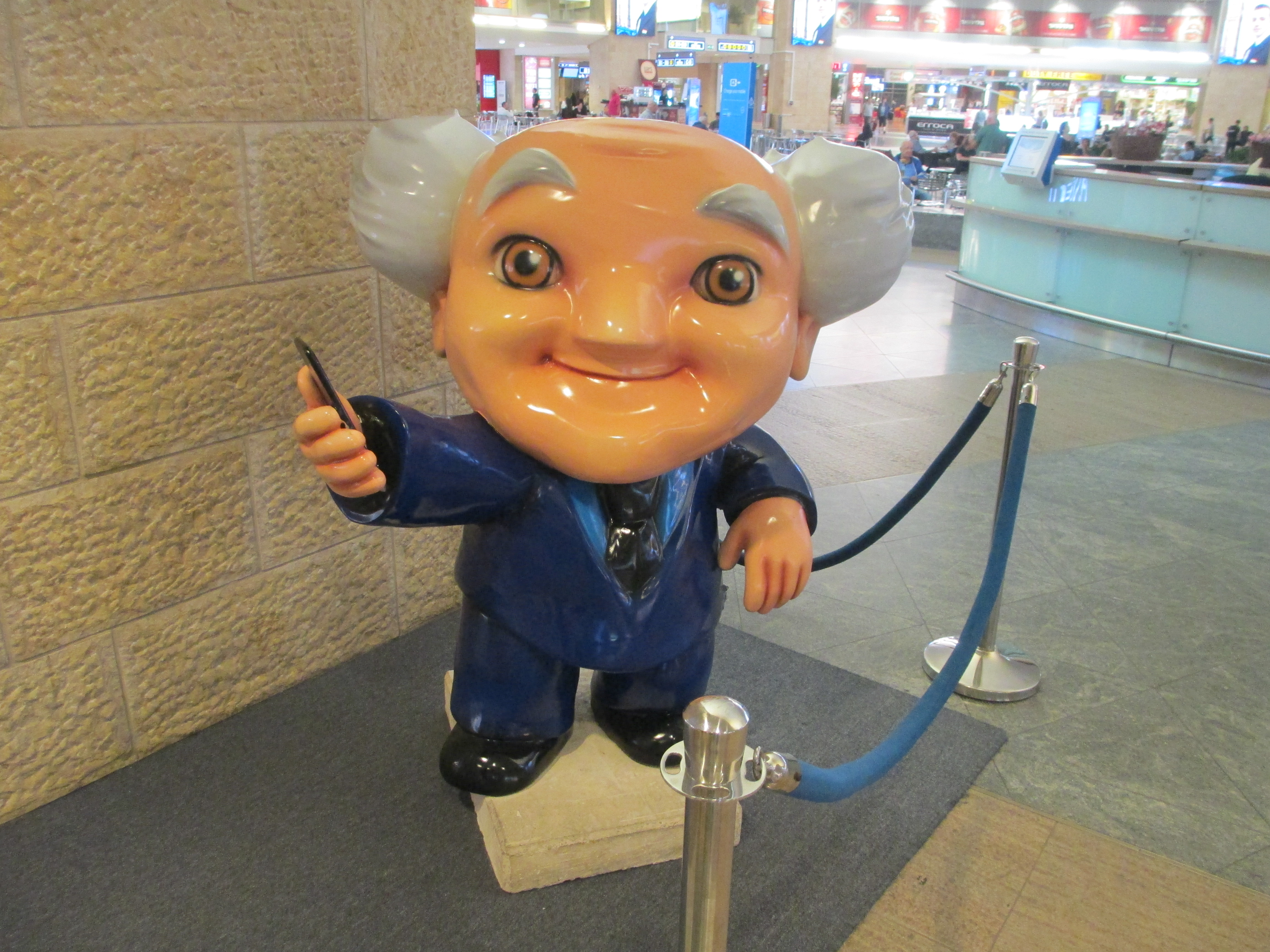 פסל של בן גוריון בטרמינל 3 בנתב"ג